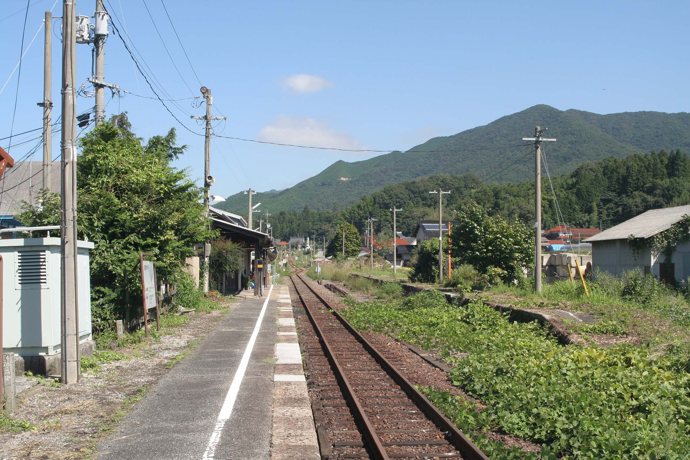 西日本旅客鉄道 小奴可駅の構内